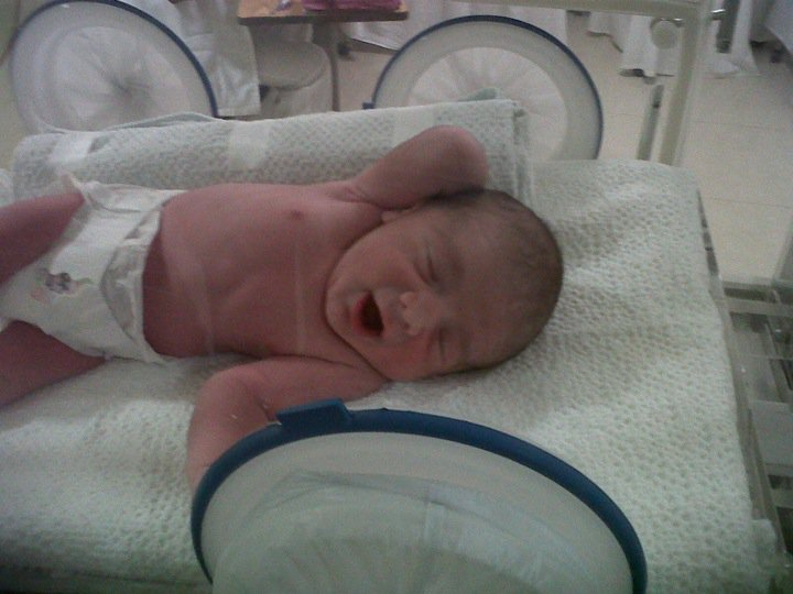 Aitor Ciriza Salas